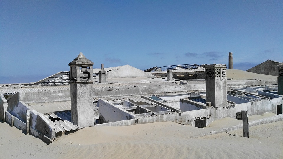 Ilha dos Tigres, Barackensiedlung der Arbeiter, Küche und Waschküche